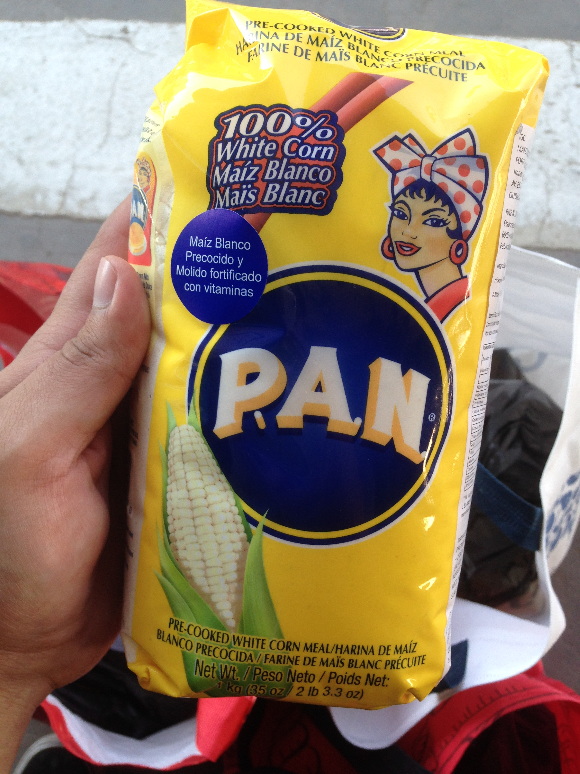 Paquete de harina PAN fabricada en Estados Unidos